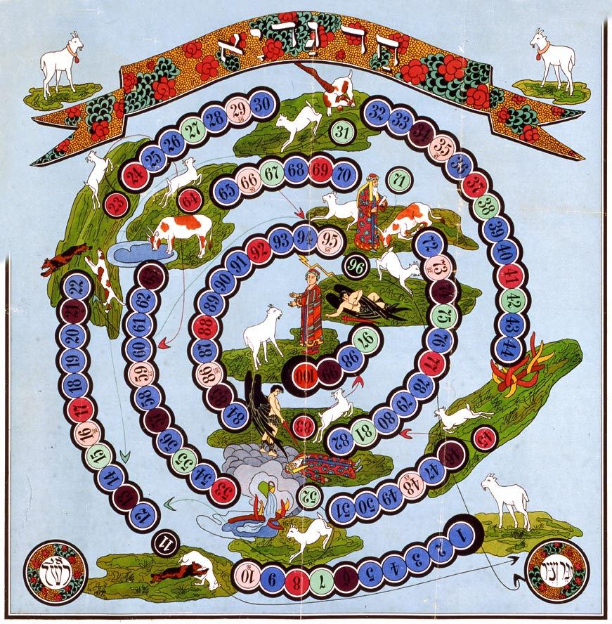 חד גדיא